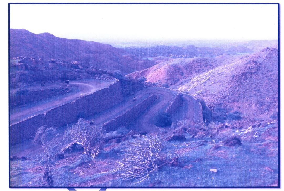 टॉडगढ